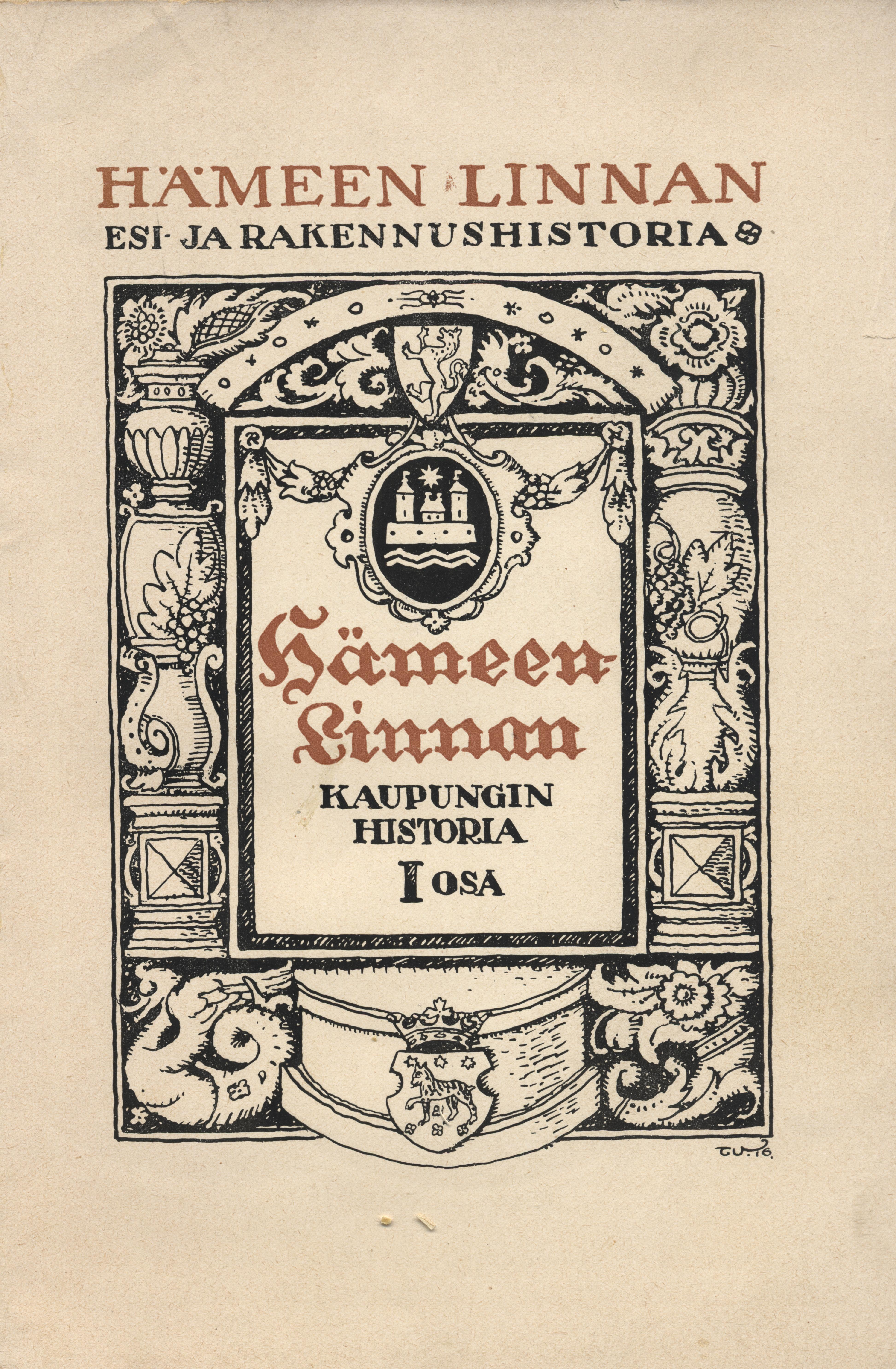 Julius Alio (19.07.1872 – 4.03.1933) books "Hämeen linnan esi- ja rakennushistoria I" 1917.